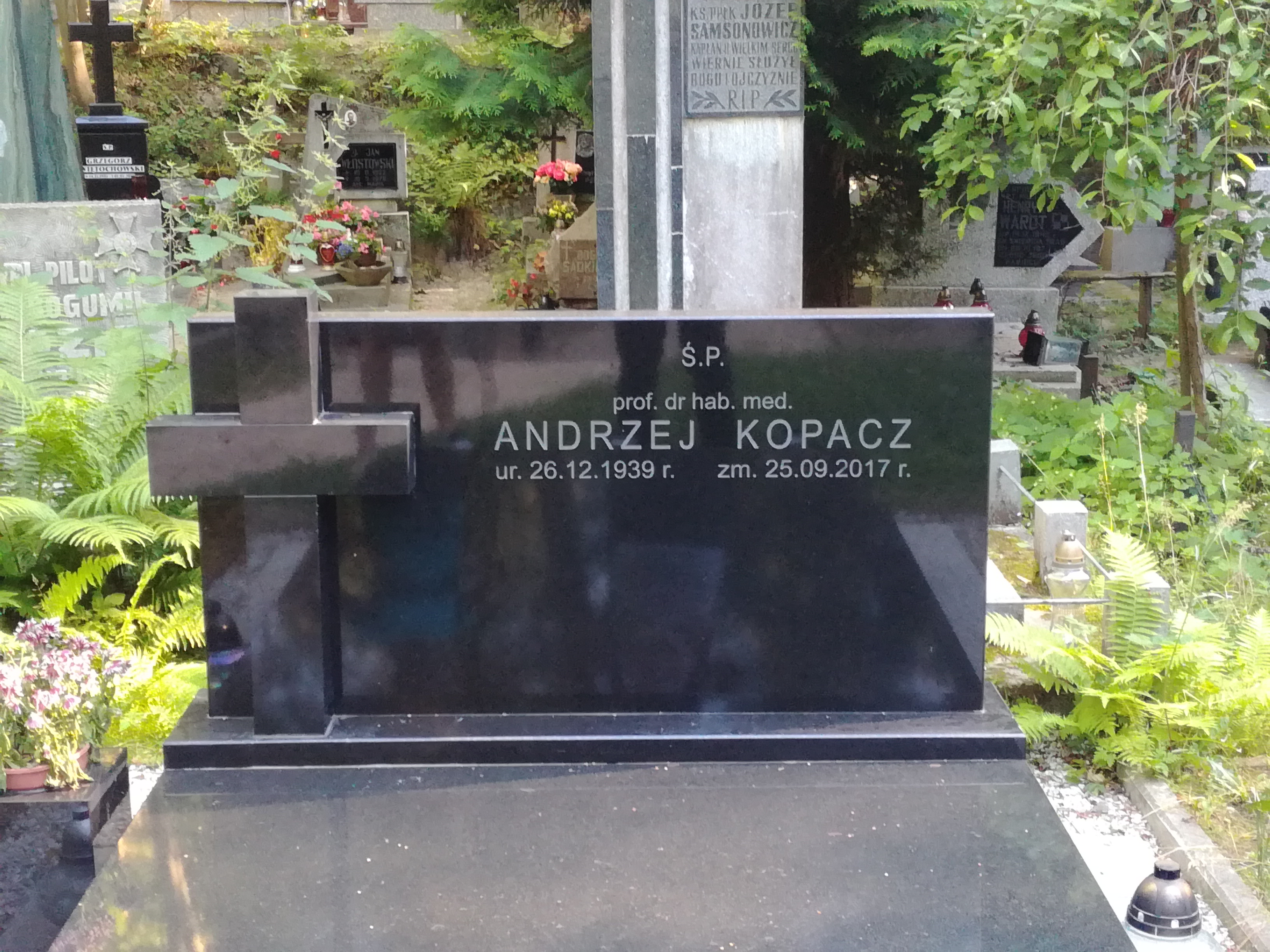 Grób prof. Andrzeja Kopacza na Srebrzysku